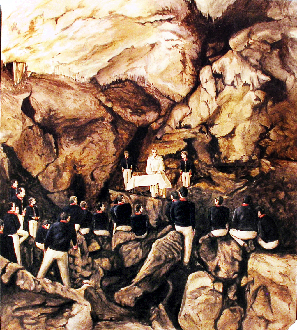 Tableau moderne de Serge Mas (2003) illustrant une messe dite dans le trou du Calel par le Père Lacordaire en 1860 (Restaurant Le Saint-Martin, Sorèze).